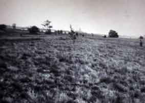 baumlose Ansicht der Insel Buhnenwerder um die Jahrhundertwende vom 19. zum 20. Jahrhundert